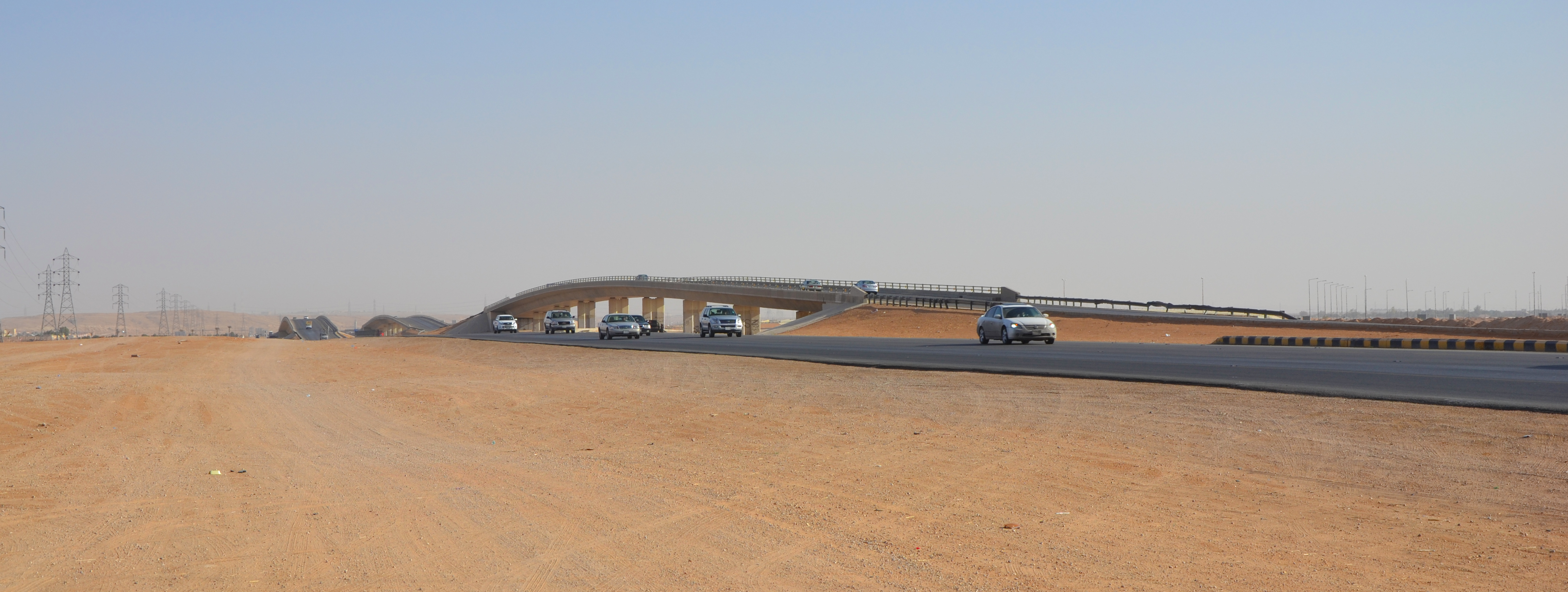 Saudi Arabia